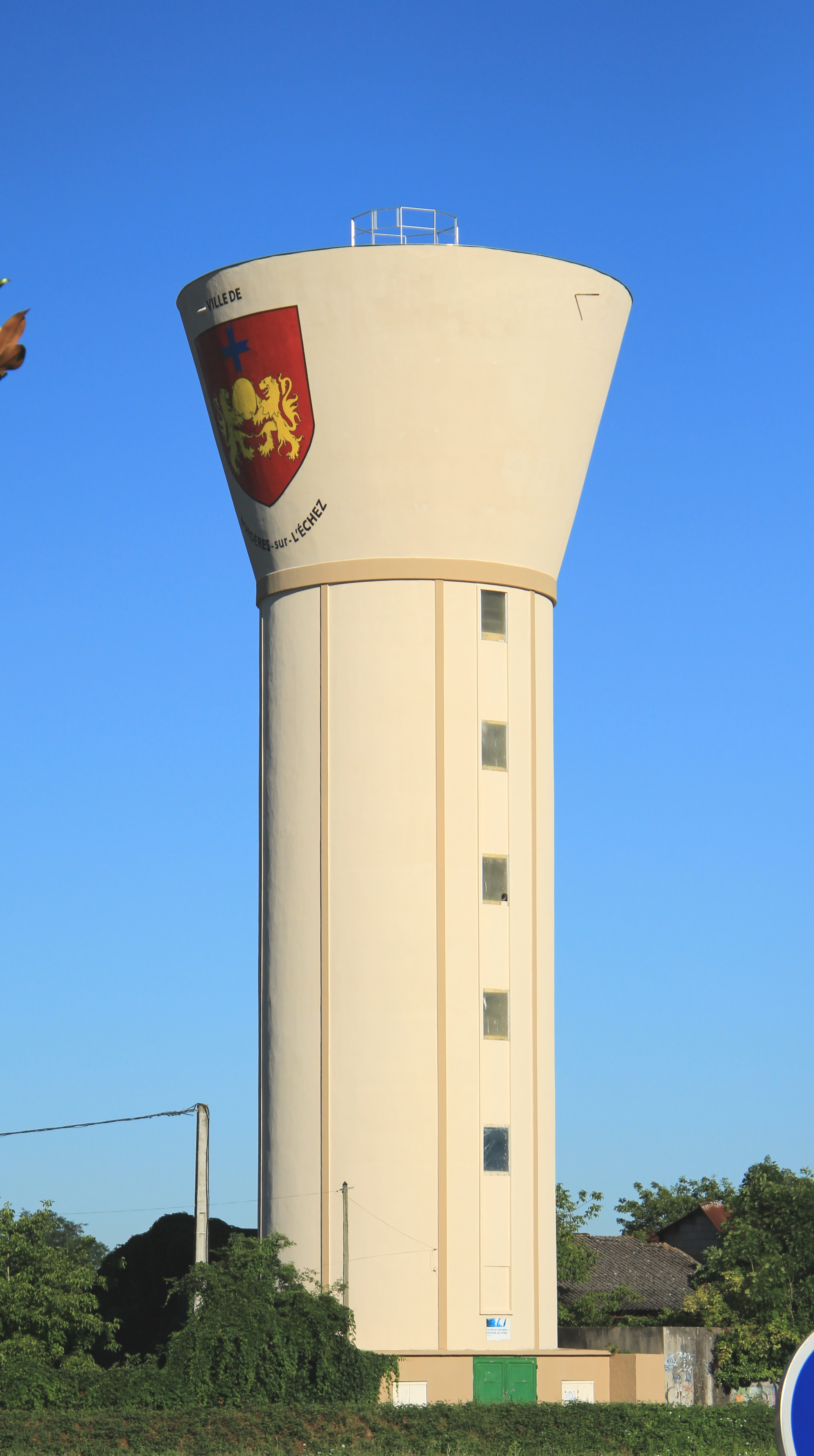 Château d'eau de Bordères-sur-l'Échez (Hautes-Pyrénées)